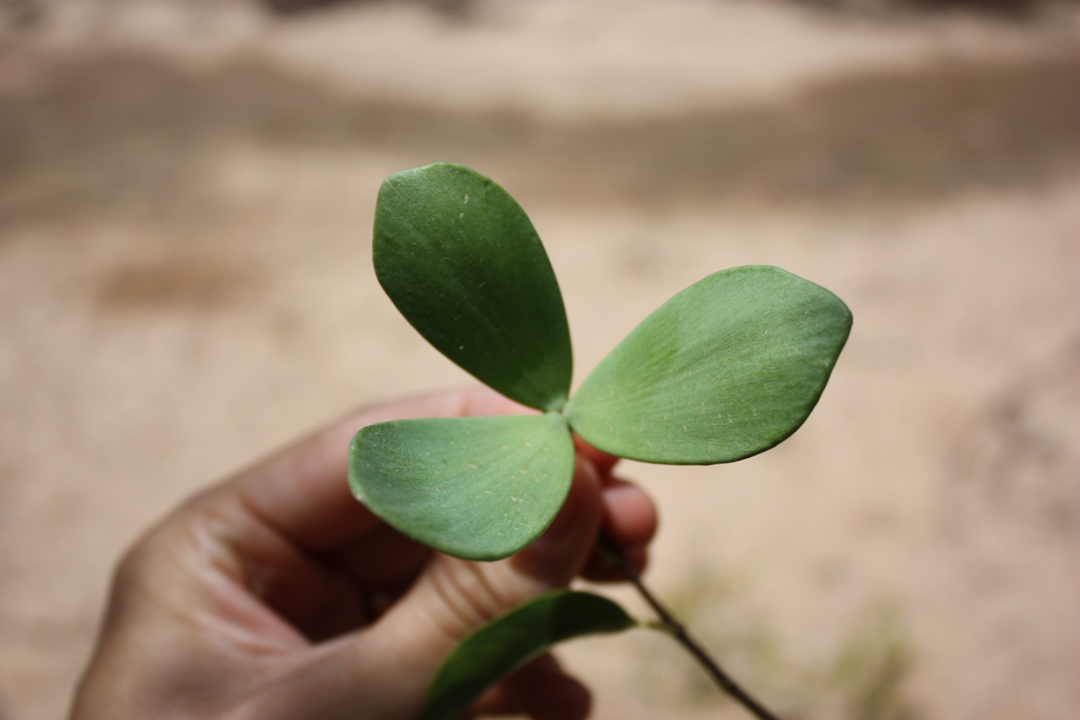 Loeseneriella africana, SW Burkina Faso